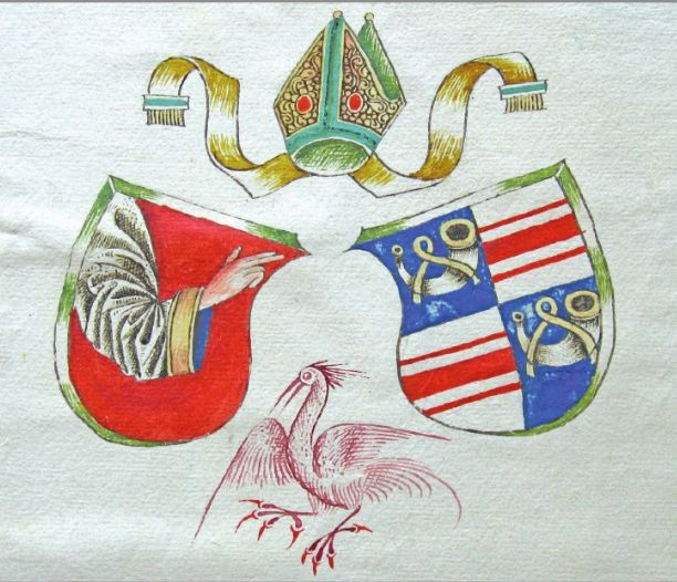 Wappen des Seckauer Bischofs Matthias Scheit in einer Lemberger Inkunabel mit Richenbach-Einband